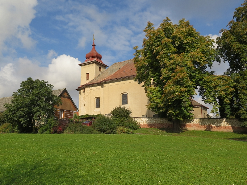 Kostel svatého Prokopa, střed vsi, Semčice.